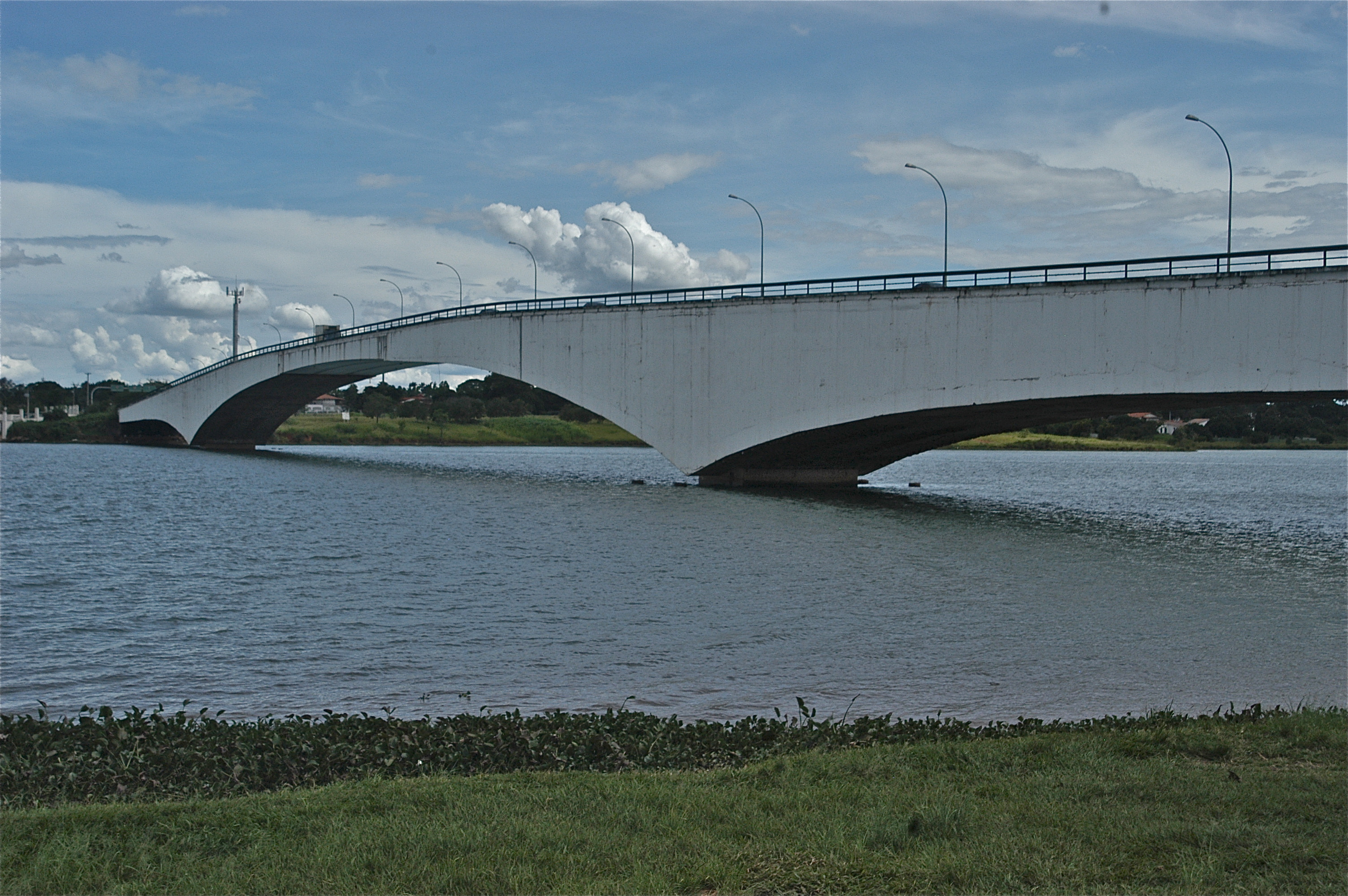 Ponte vista da praça dos orixás, na margem oeste